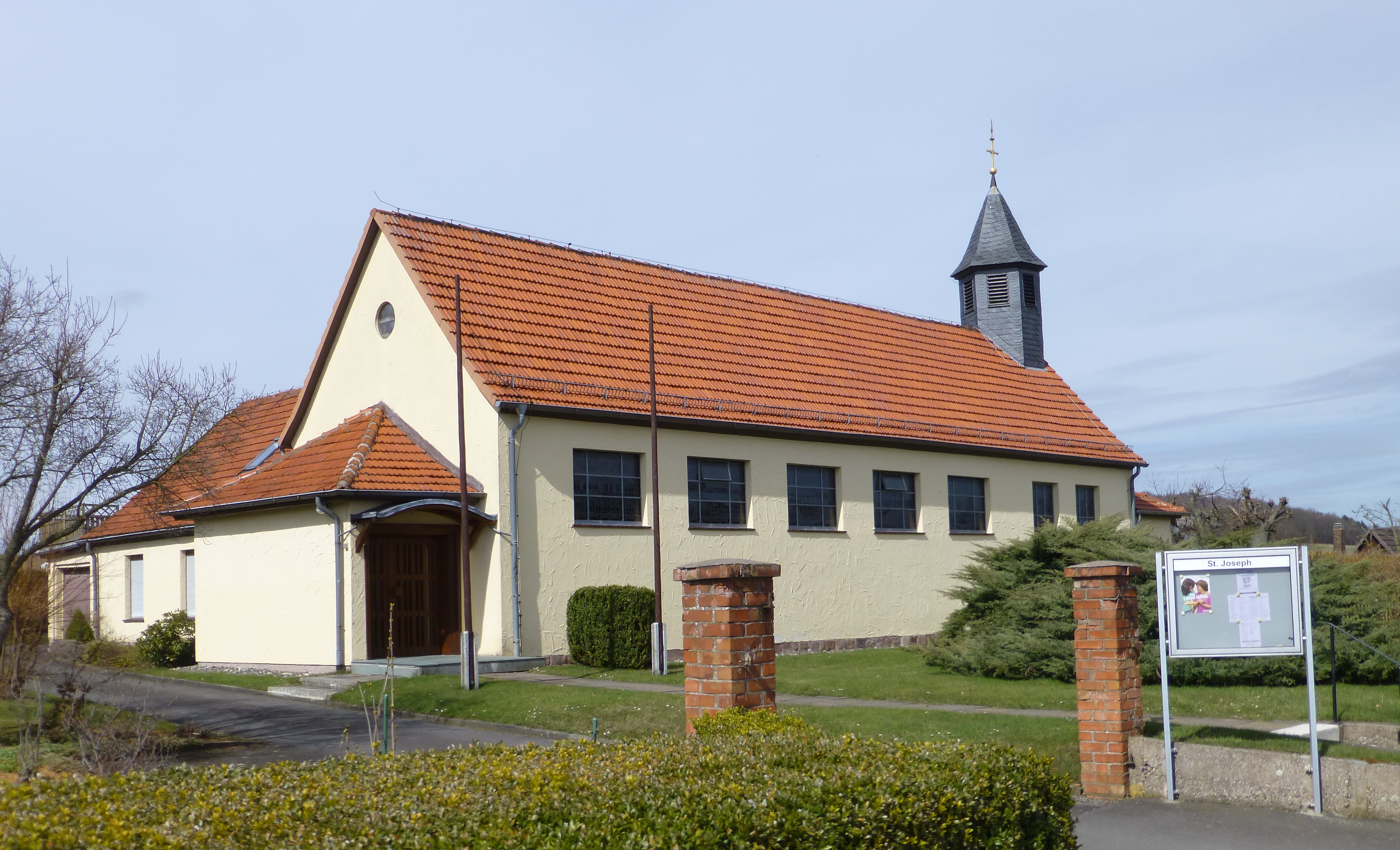 Katholische Kirche St. Joseph in Hebenshausen, Gemeinde Neu-Eichenberg, Nordhessen.